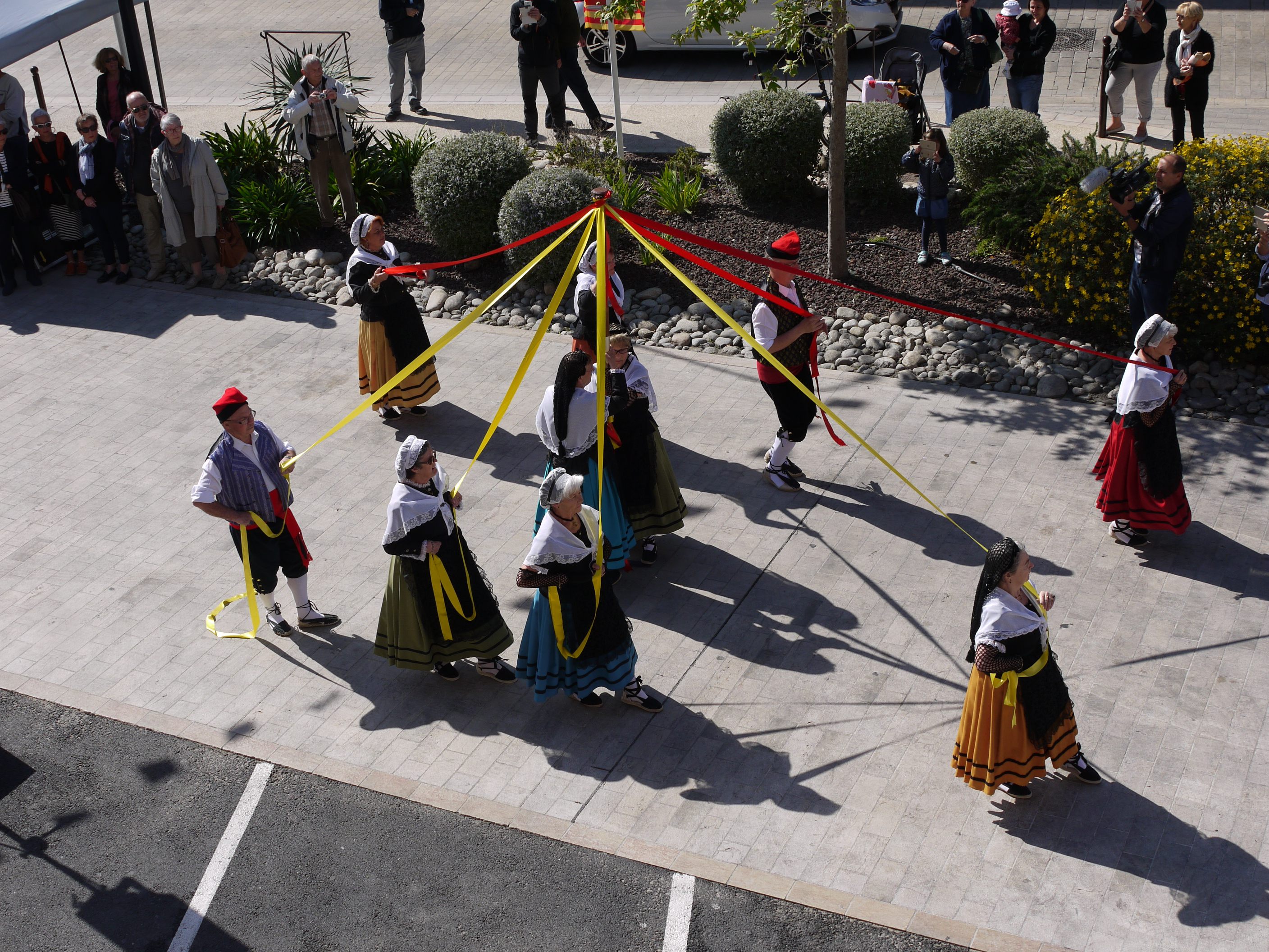 Danses catalanes sur la place Jordi Barre à Canet-en-Roussillon